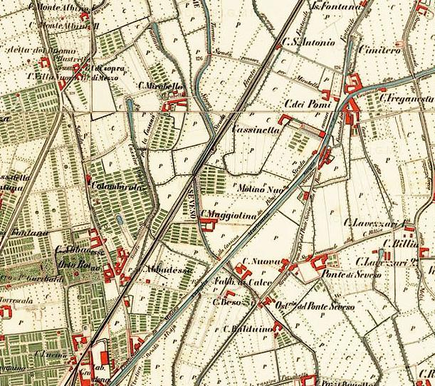 Frammenti della carta di manovra del nord Milano dell'IGM